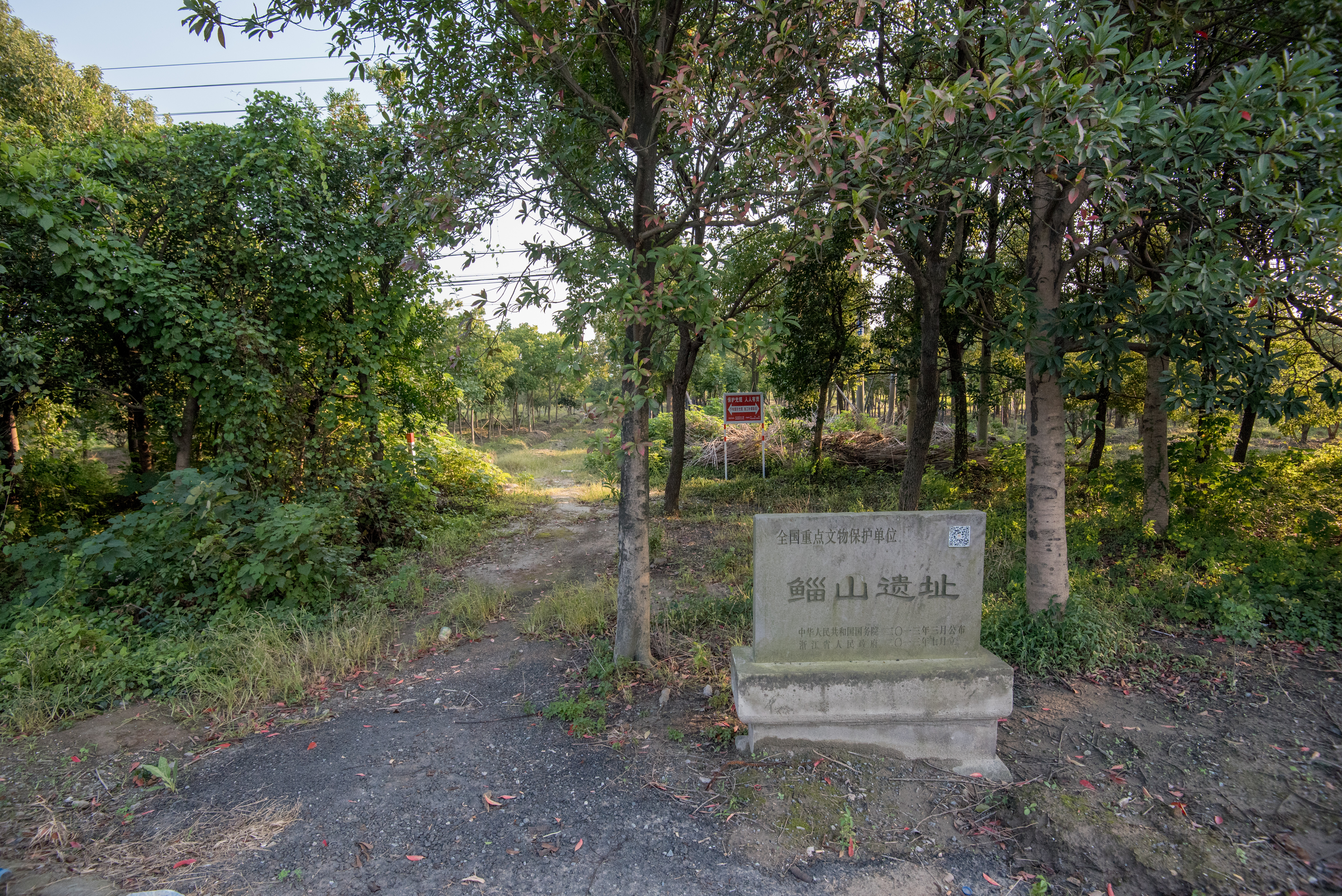 余姚鲻山遗址